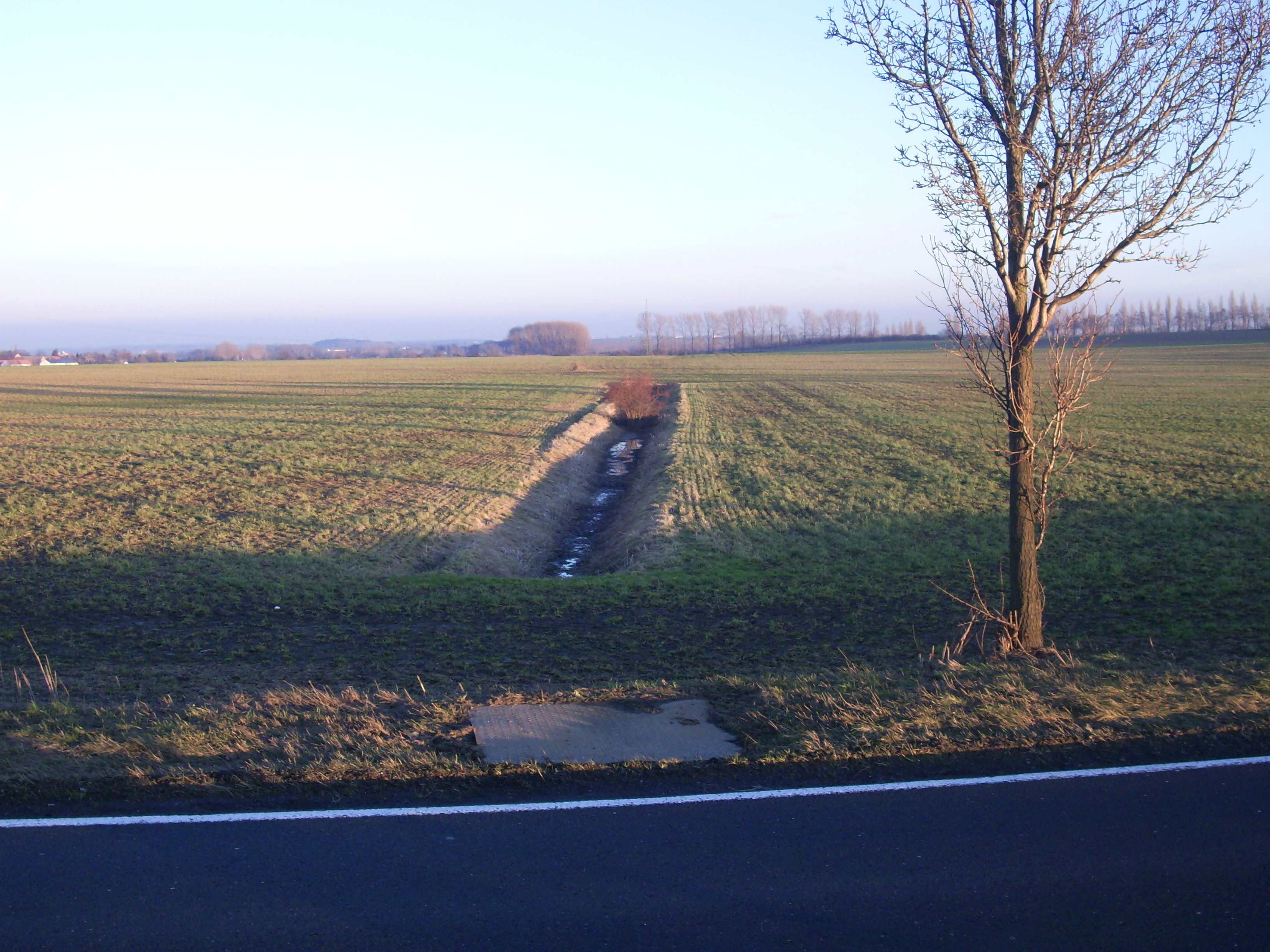 Blick auf die Lage des früheren Heiligen Sees bei Paltzschen